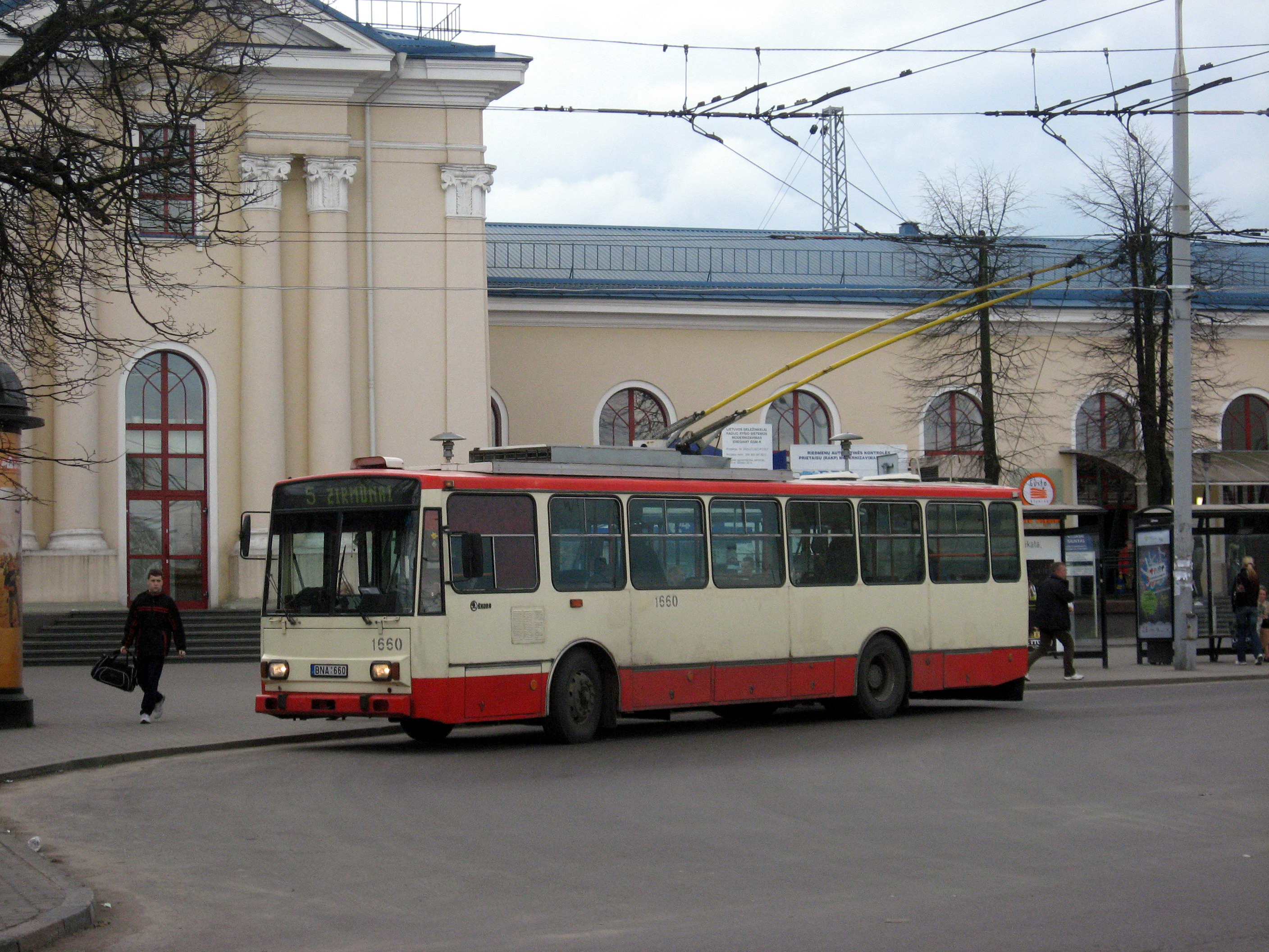 Trolejbus ve Vilniusu